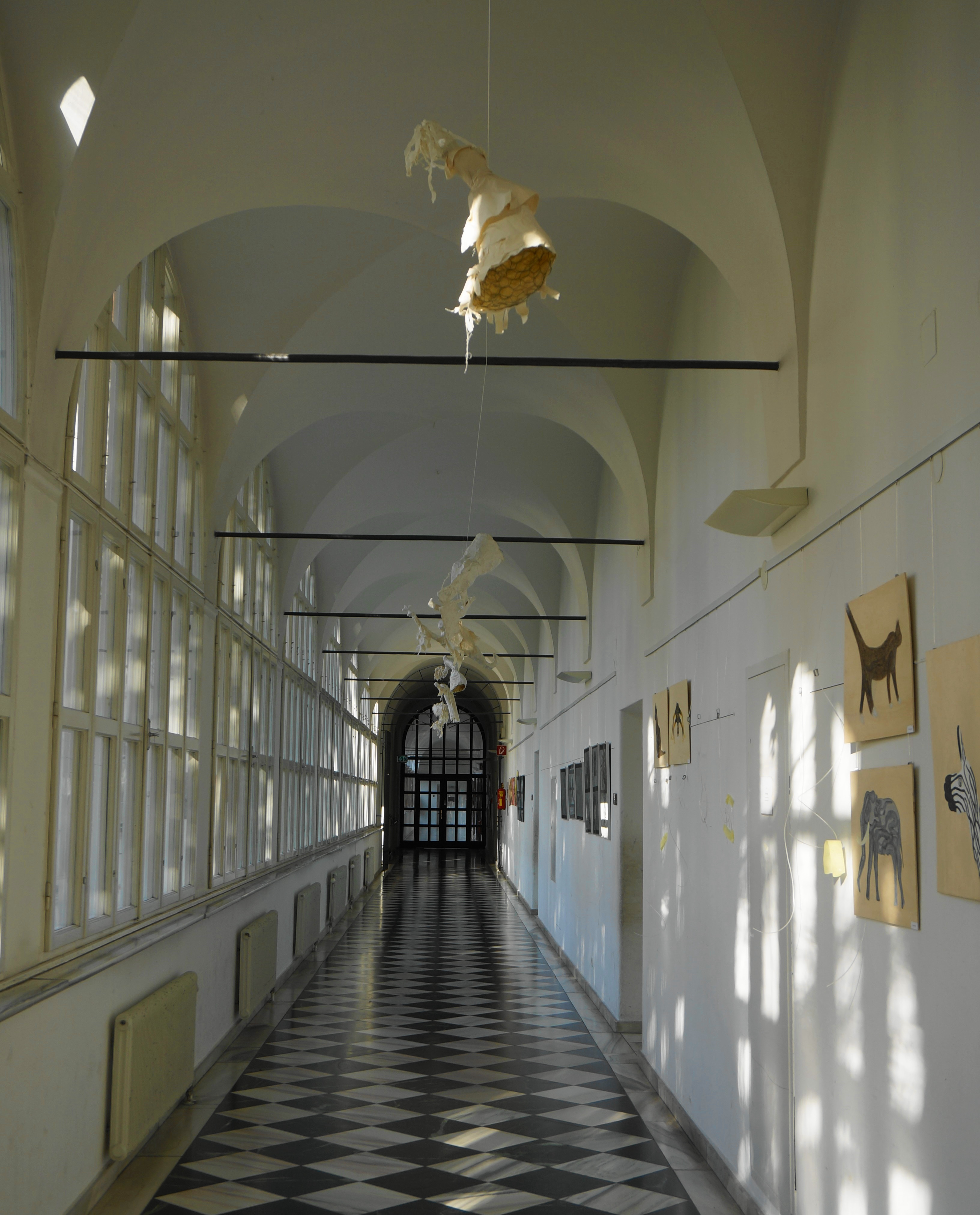 Schultrakt des BRG Klagenfurt-Viktring mit dem Schwerpunkt Musik und Bildnerische Erziehung (BE)